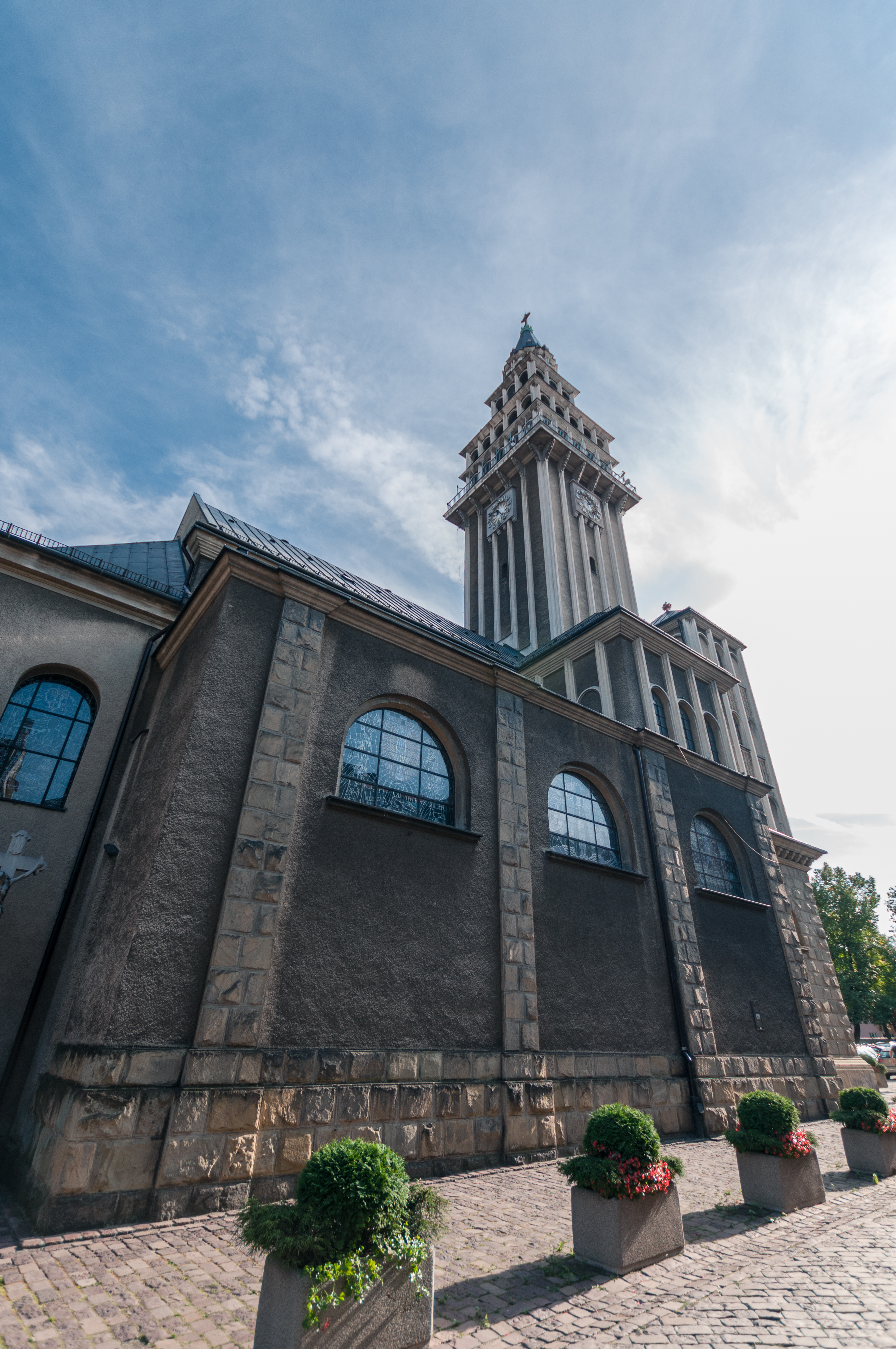 Bielsko-Biała, Katedra św. Mikołaja Wikidata has entry Q2942406 with data related to this item.